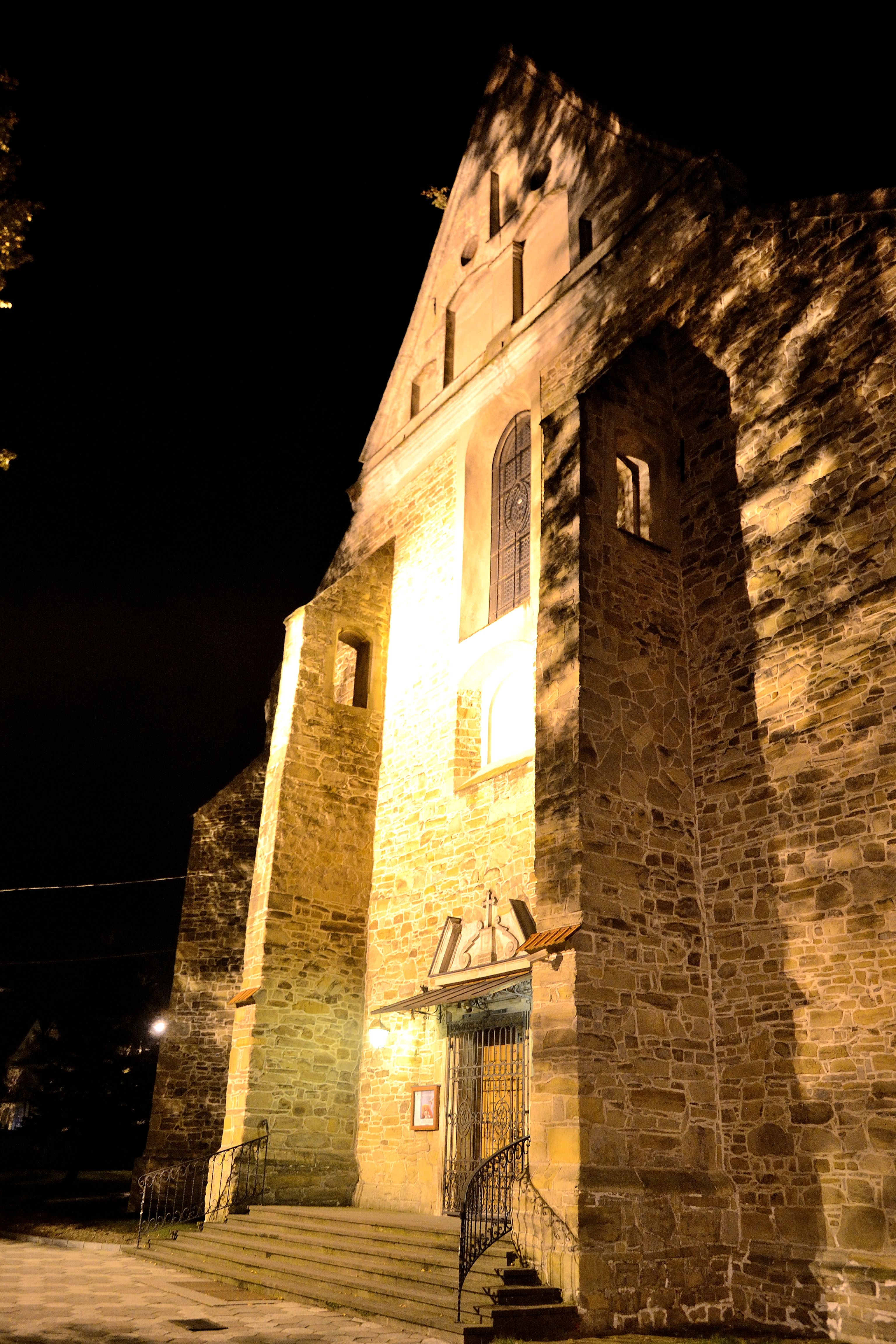 Strzyżów, kościół par. p.w. Matki Boskiej Niepokalanie Poczętej, 2 poł. XV, 3 ćw.. XVIII, 1896-1897